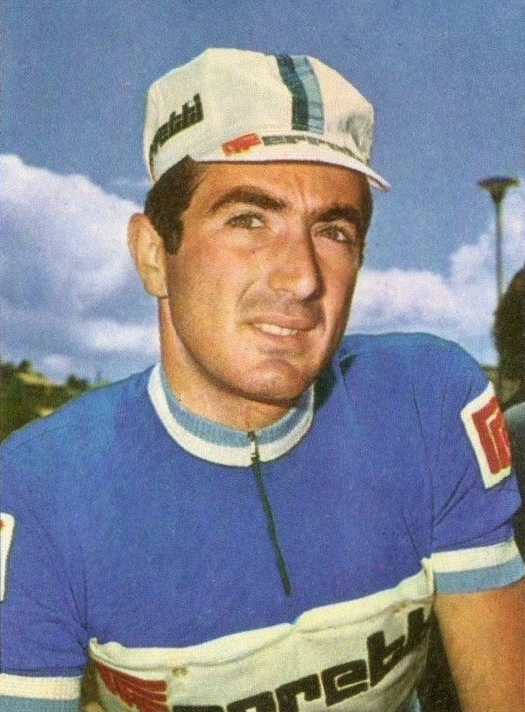 Ciclismo SPRINT '71- PANINI -Figurina n.131- SIMONETTI - ITALIA -Rec